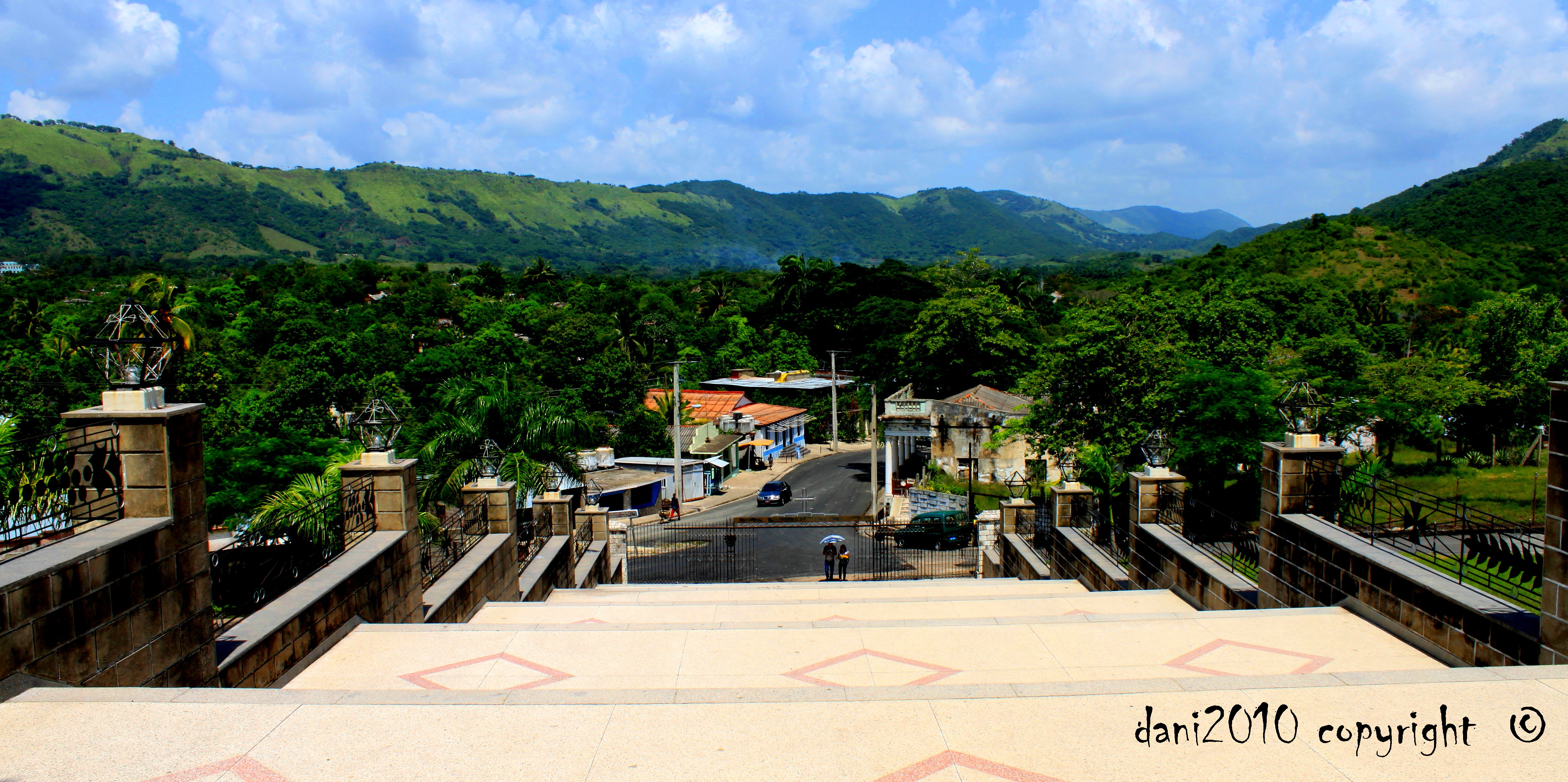 El solano invade esta perspectiva a la salida de el Santuario de la Virgen del Cobre